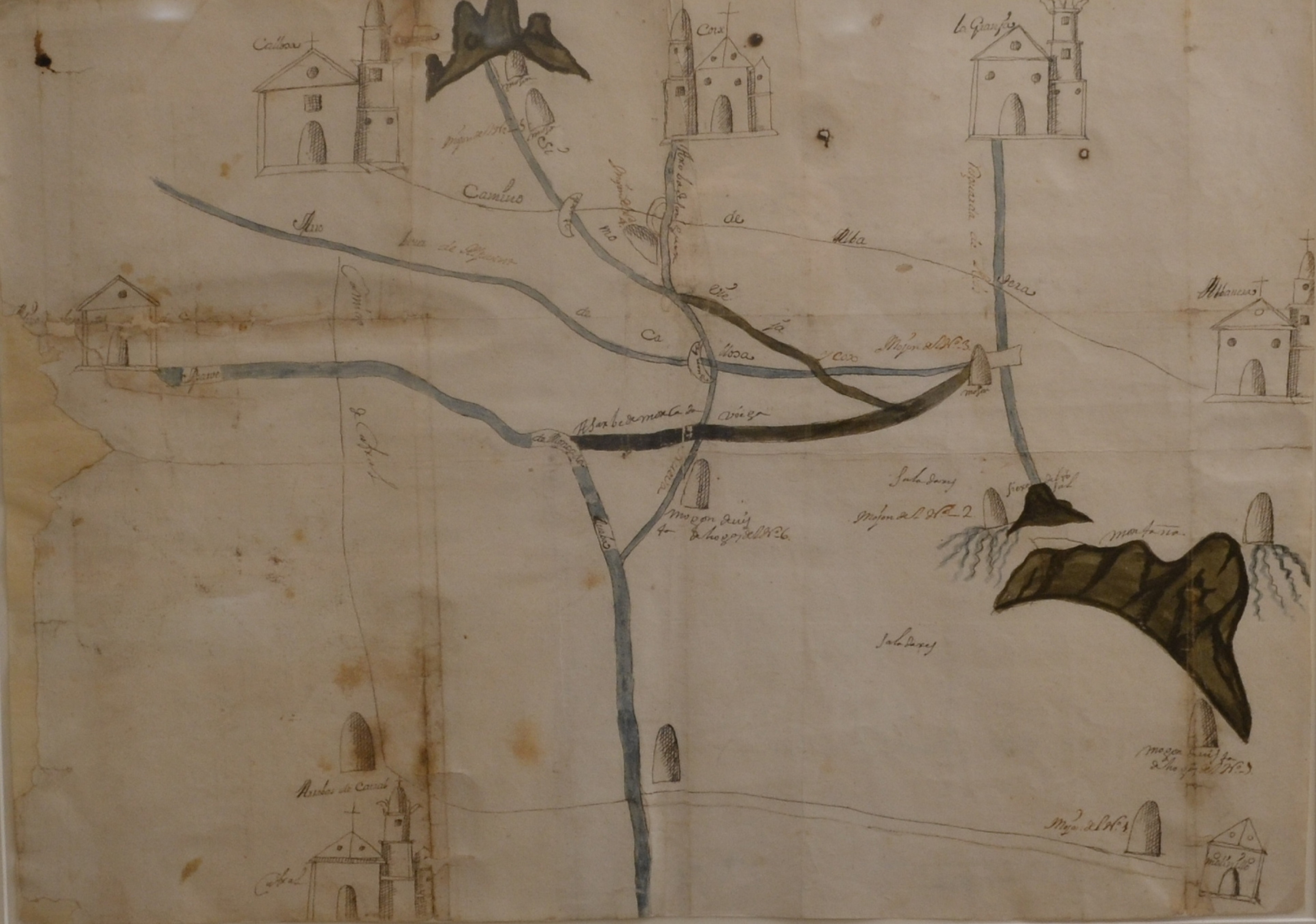 Mapa de 1729 dels termes municipals de Callosa de Segura, Coix, Albatera i la Granja de Rocamora. ARV: Mapes i plànols, núm. 246. Arxiu del Regne de València.